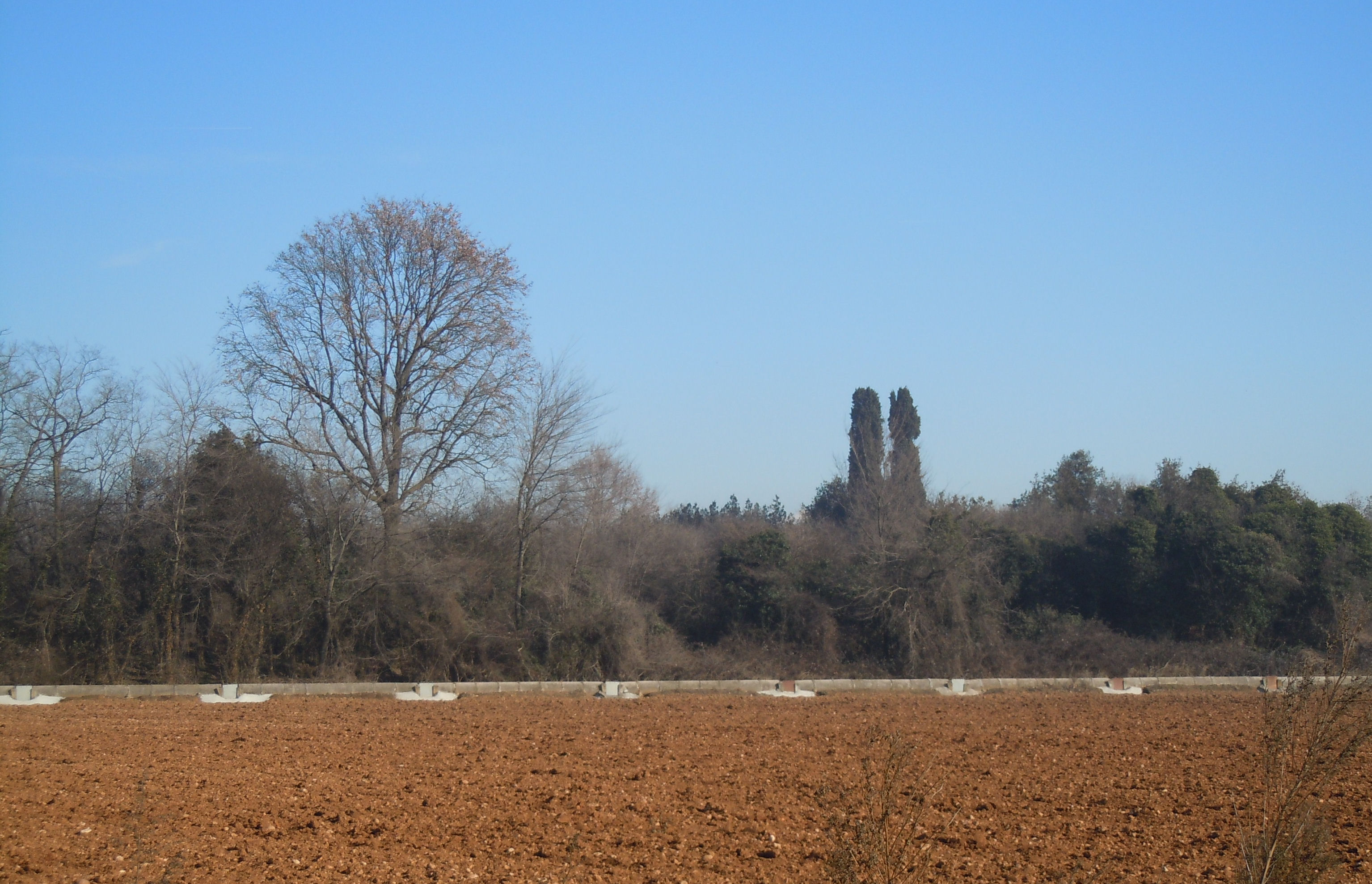 Medole, Monte Medolano.